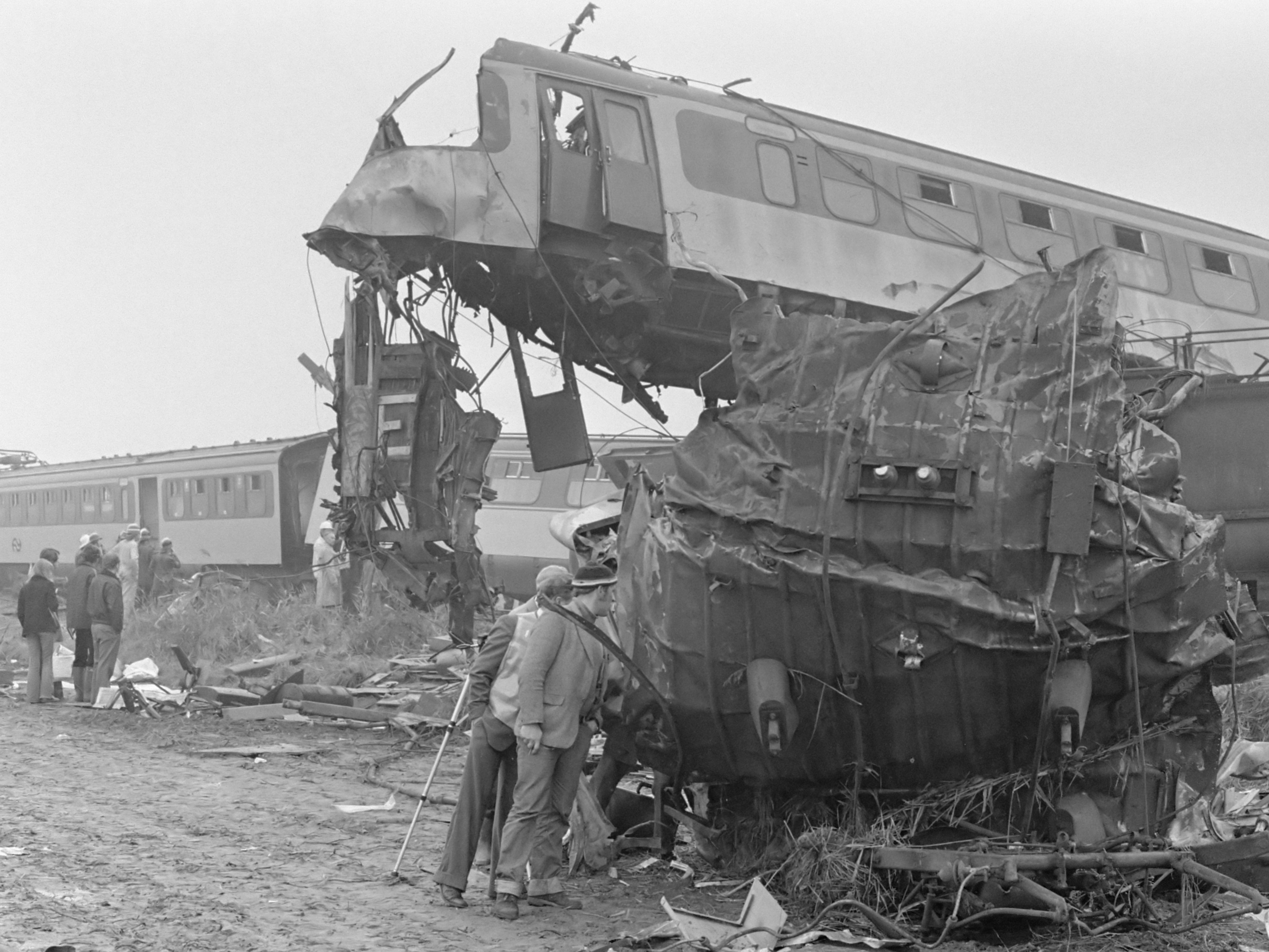 Treinramp bij Goes; eerste wagon van de stoptrein op goederentrein met op de voorgrond brandweer bezig bij geheel vernielde bestuurscabine 27 oktober 1976